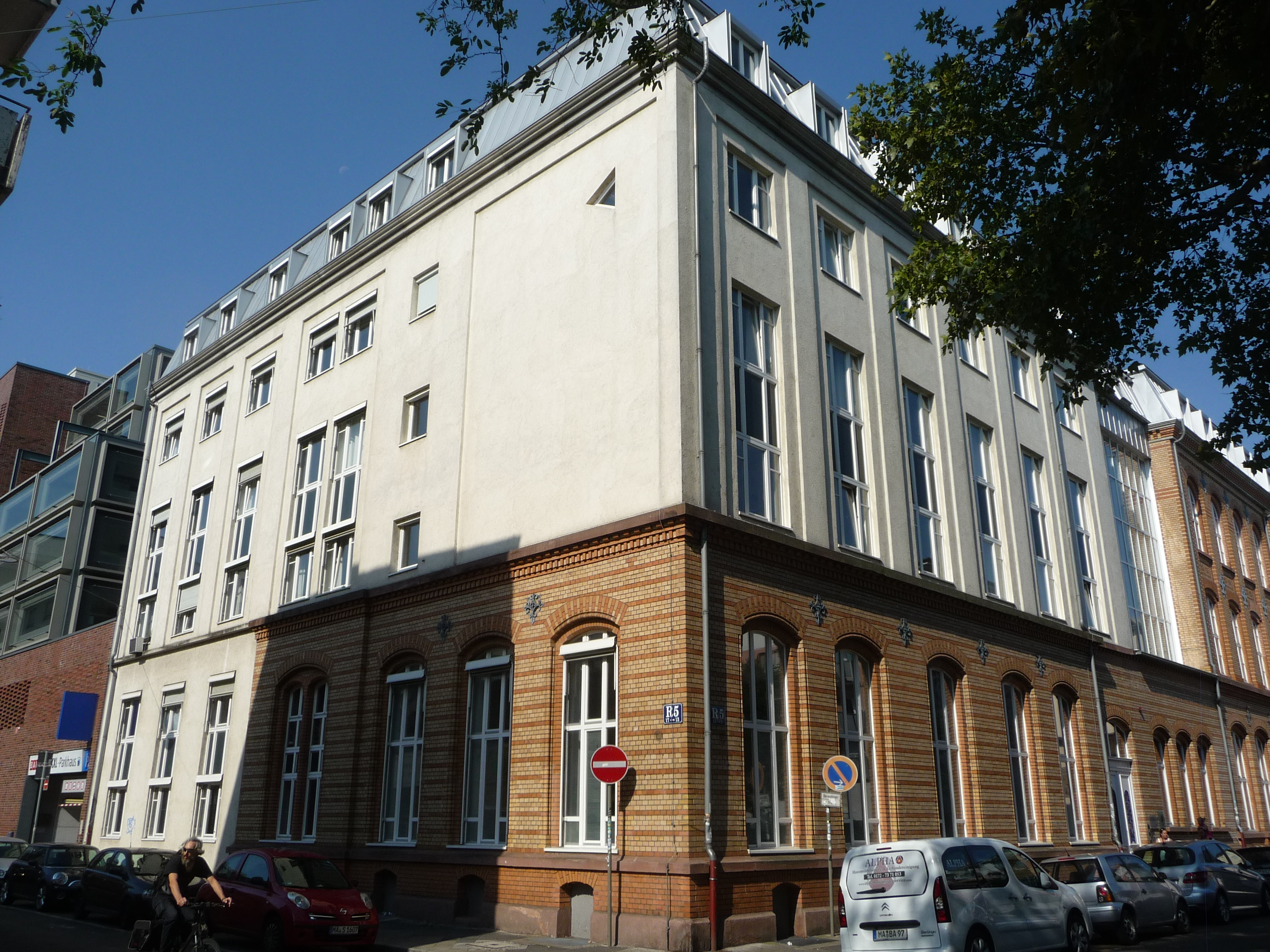 Das Institut für Deutsche Sprache (IDS) in Mannheim hat das Ziel, die deutsche Sprache in ihrem gegenwärtigen Gebrauch und in ihrer neueren Geschichte wissenschaftlich zu erforschen und zu dokumentieren.